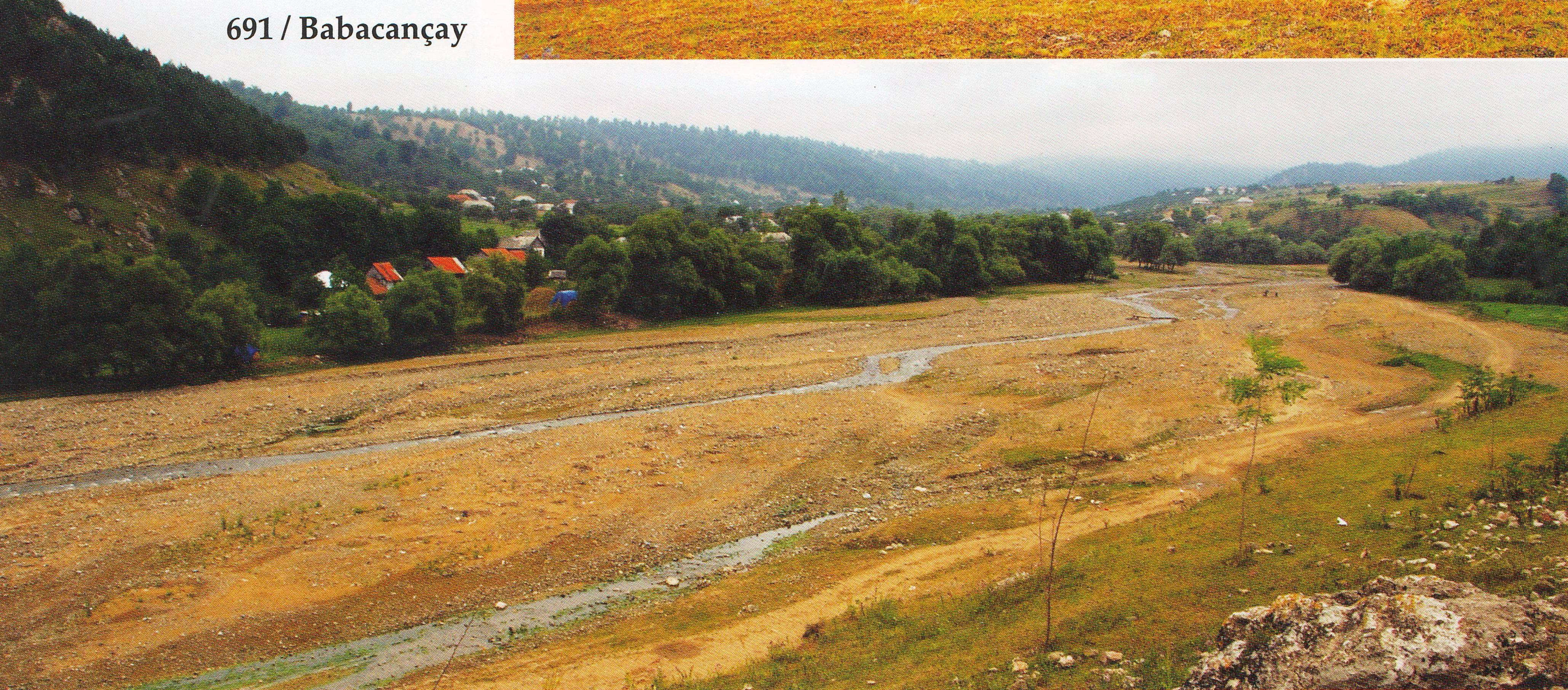 Gədəbəy Babacançay